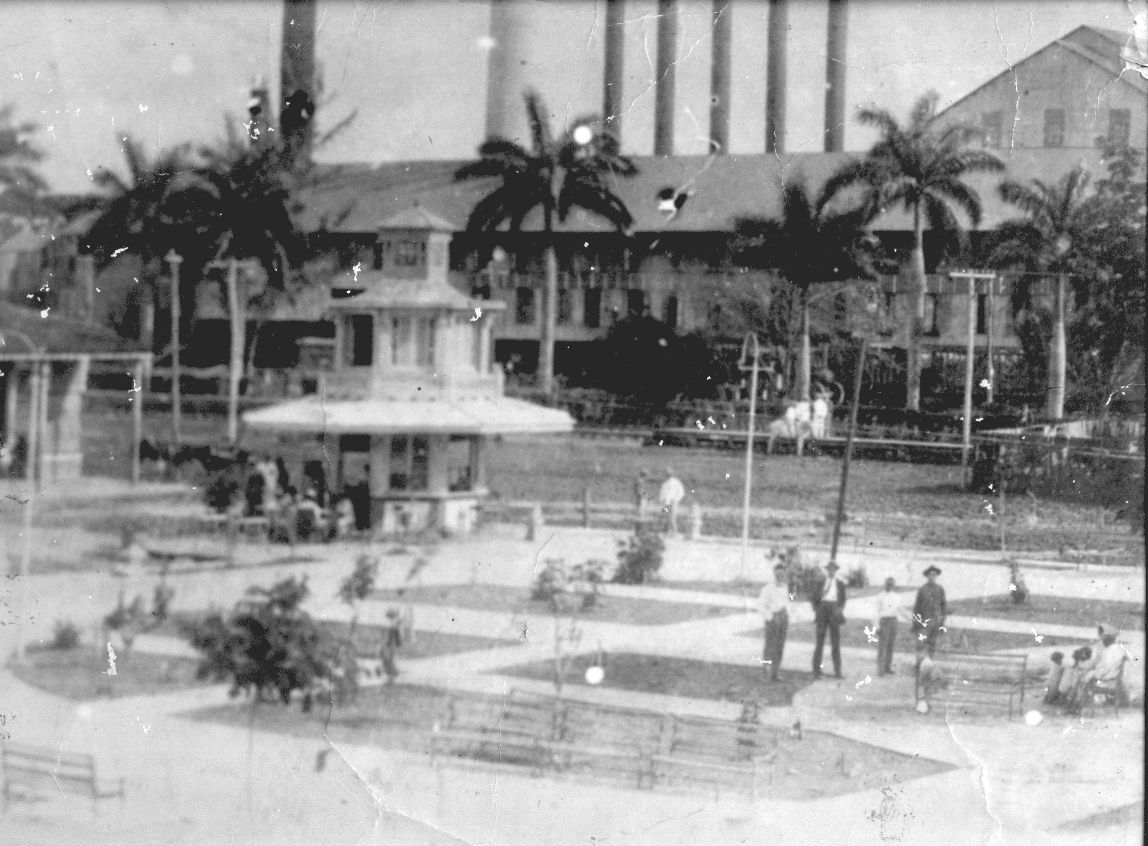 Parque y plaza deJatibonico, Provincia de Sancti Spíritus. Hoy Serafín Sánchez Valdivia.